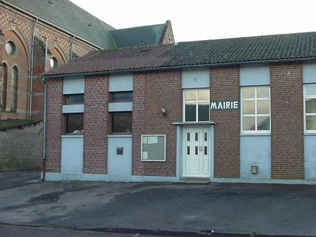 La mairie dans le prolongement de la salle des fêtes.